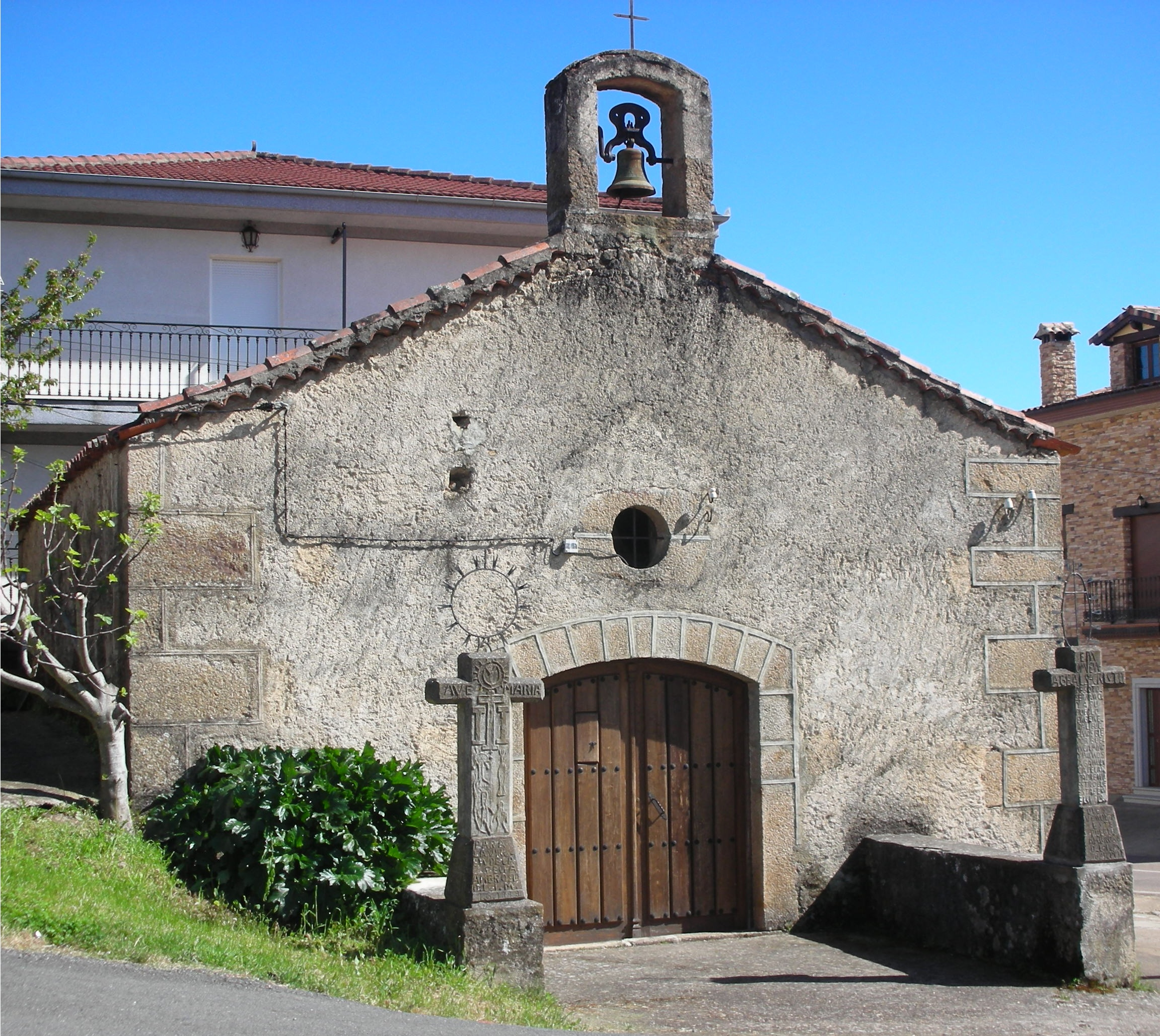 Ermita de l' Humilladero de la commune de Sotoserrano en Espagne